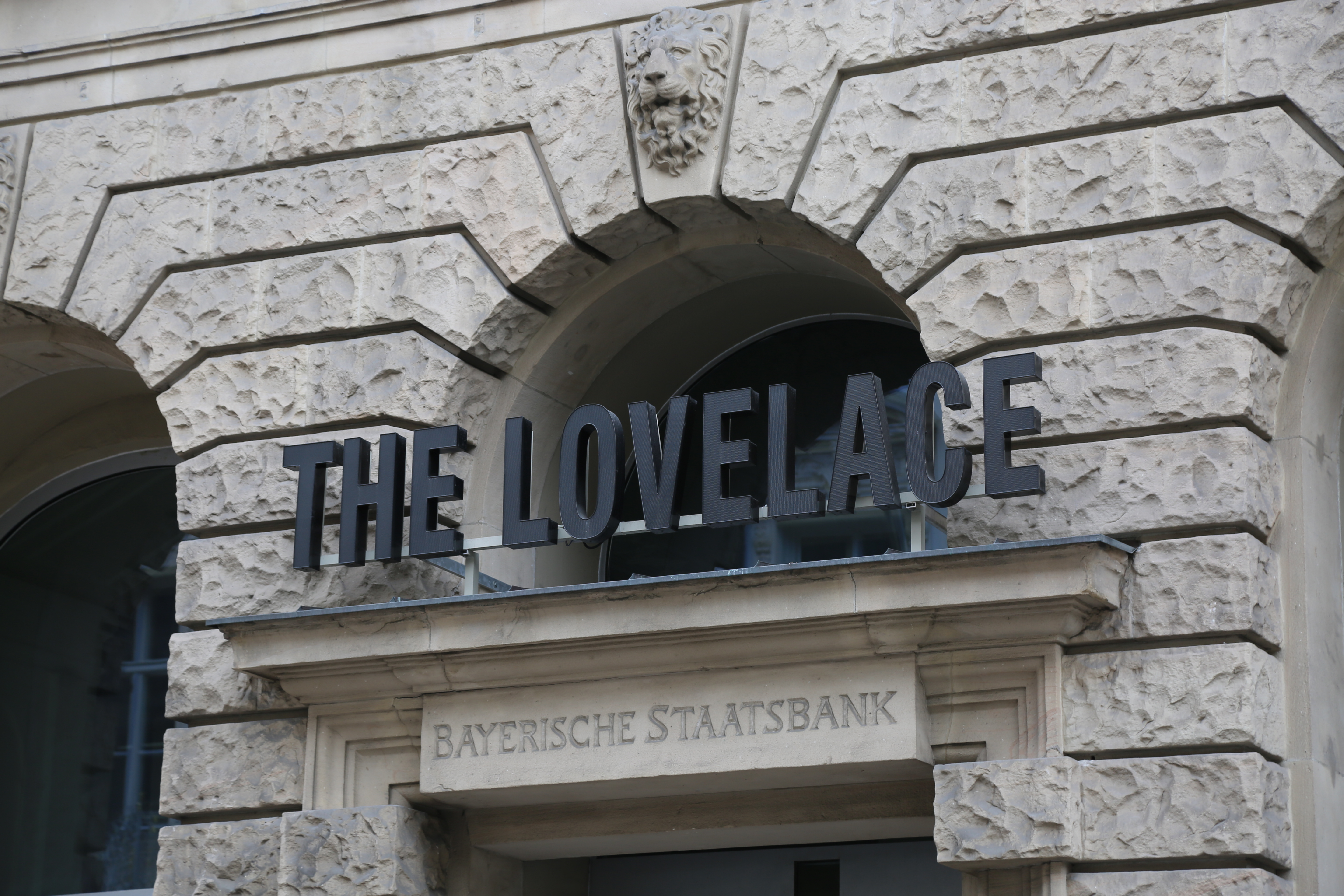 Das Lovelace war ein Design-Hotel, das 2018 zur Zwischennutzung im ehemaligen Bankgebäude München, Kardinal-Faulhaber-Straße 1 eingerichtet wurde.